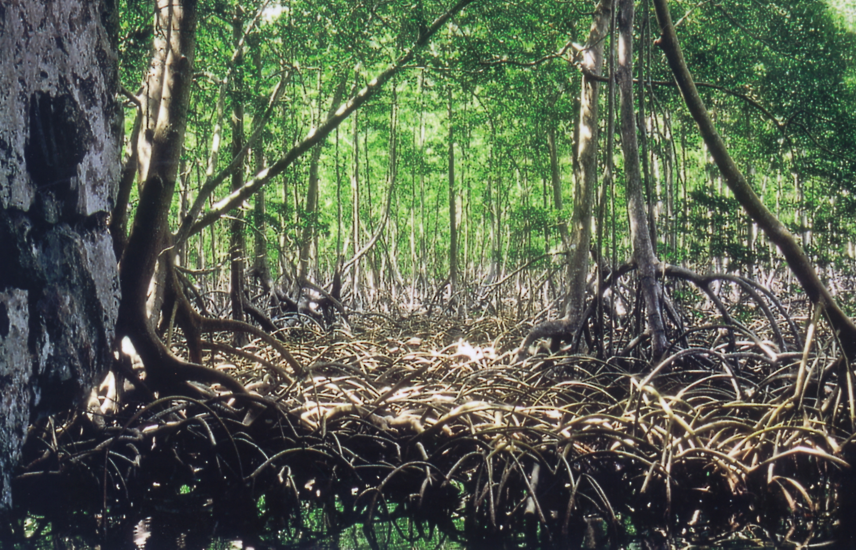 Nationalpark Los Haitises, Dominikanische Republik: dichter Mangrovenwald